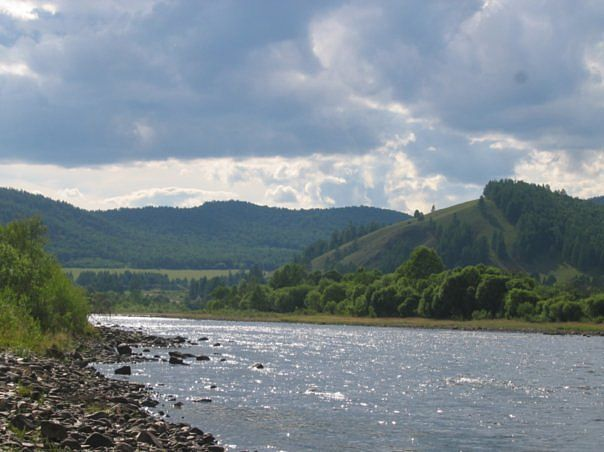 река Джида